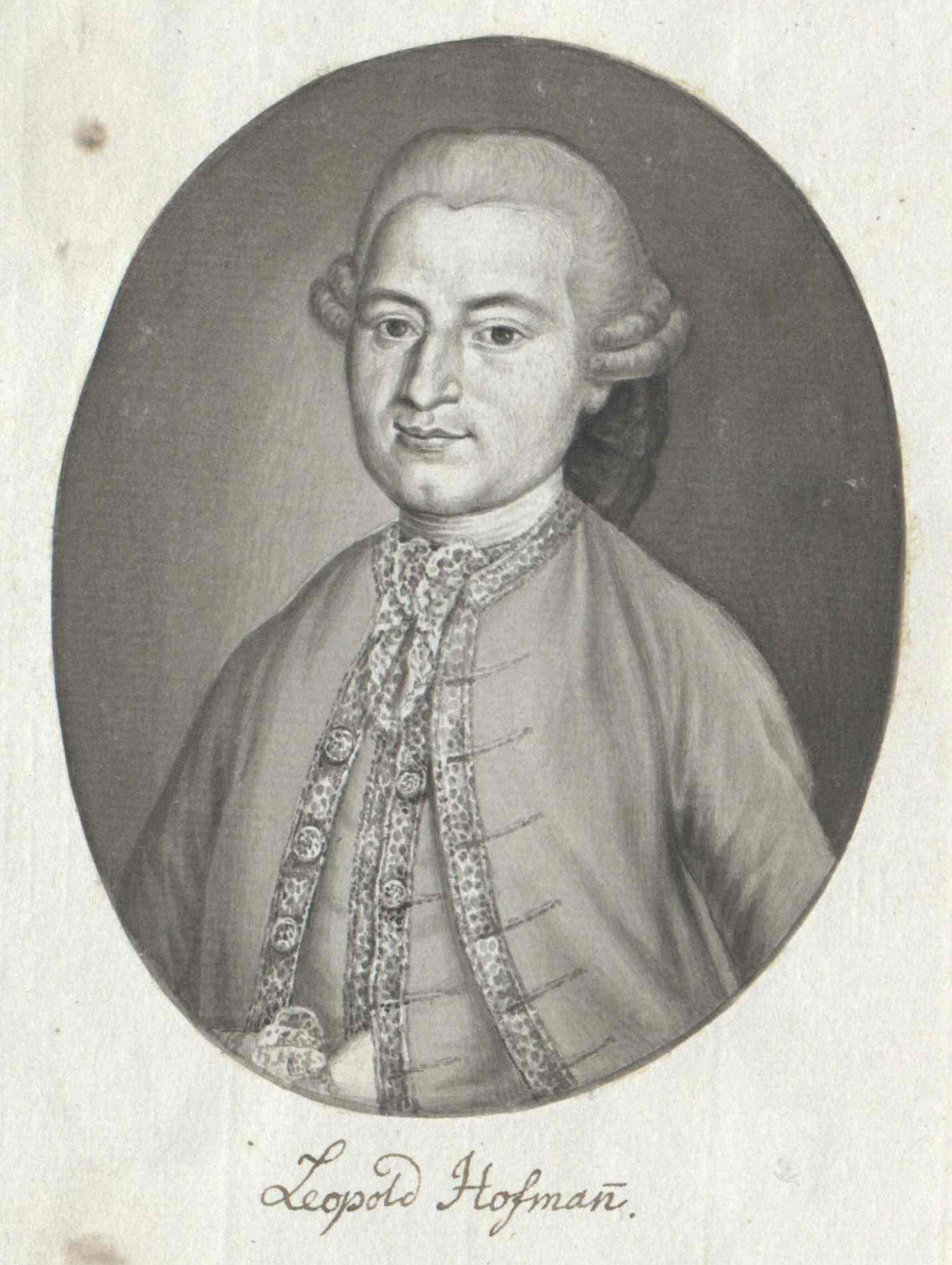 Leopold Hofmann (1738–1793) Wien, Österreichische Nationalbibliothek, Bildarchiv und Grafiksammlung, Porträtsammlung, Inventar-Nr. PORT_00155244_01